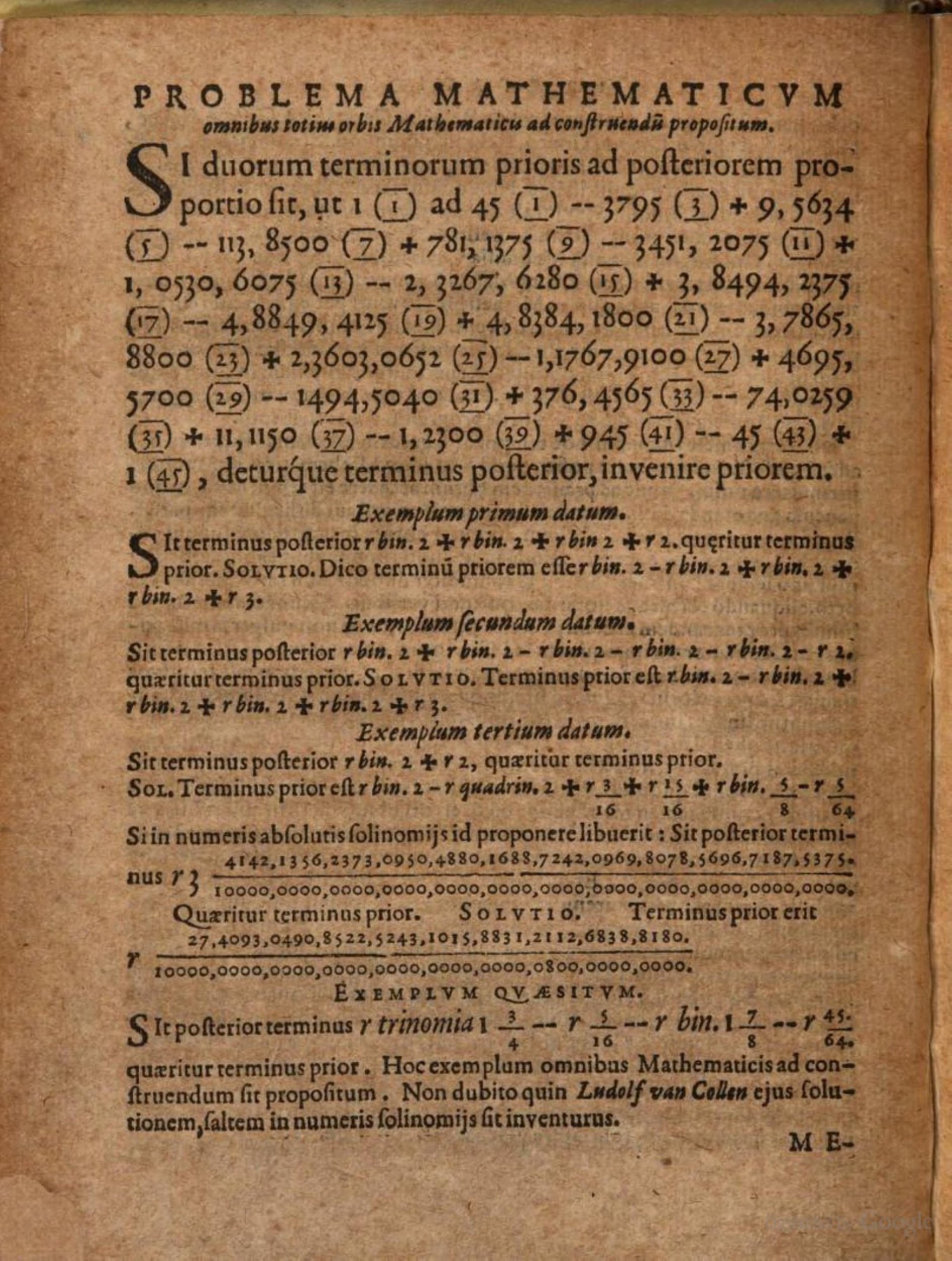 page de la préface de l'ouvrage d'Adriaan van Roomen « Ideae mathematicae...» où celui-ci décrit son énigme mathématique, sous forme d'une équation du 45è degré